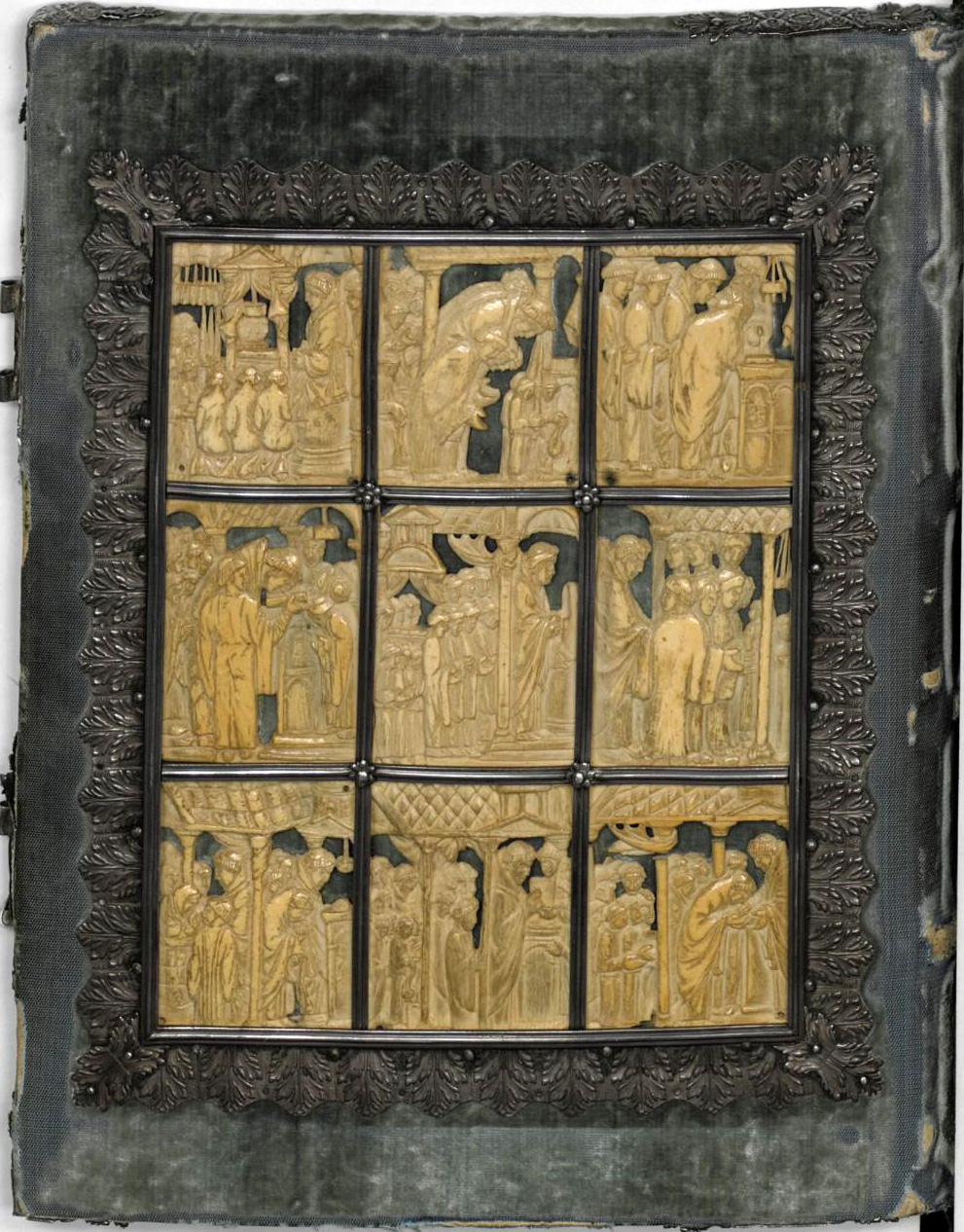 Sacramentaire de drogon manuscrit latin de la BNF cote 9428.